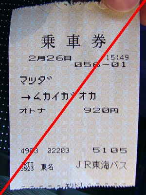 JR東海バス東名高速線（急行）の乗車券（車内発券）、東名松田→東名向ヶ丘。 撮影日：2004年02月26日 撮影者：cory 付記： 加工入り。 A ticket from Tōmei-Matsuda to Tōmei-Mukaigaoka, via JR-Tokai-Bus Tōmei-kōsoku-line. Date: 2004-02-26 (Feb 26, 2004) Author: ISAKA Yoji (cory)